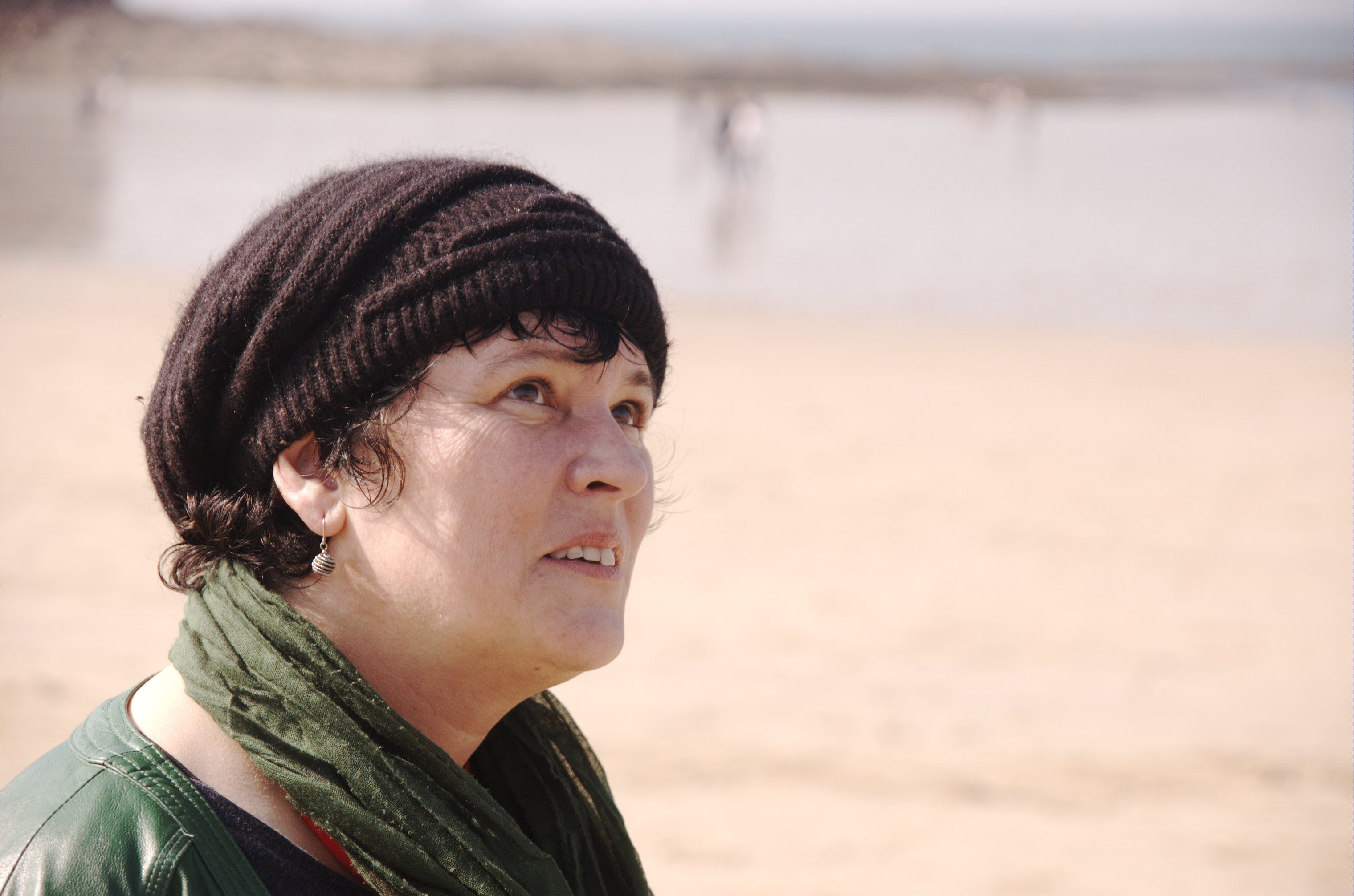 Saint Malo 2015